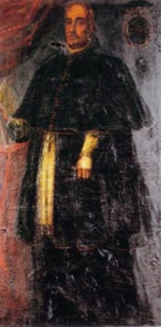 Retrato de Tomás de Borja y de Castro-Pinós o Tomás de Borja y Castro, natural de Gandía, Obispo de Málaga, Arzobispo de Zaragoza y Capitán General de Aragón y hermanastro de San Francisco de Borja y Aragón, IV Duque de Gandía